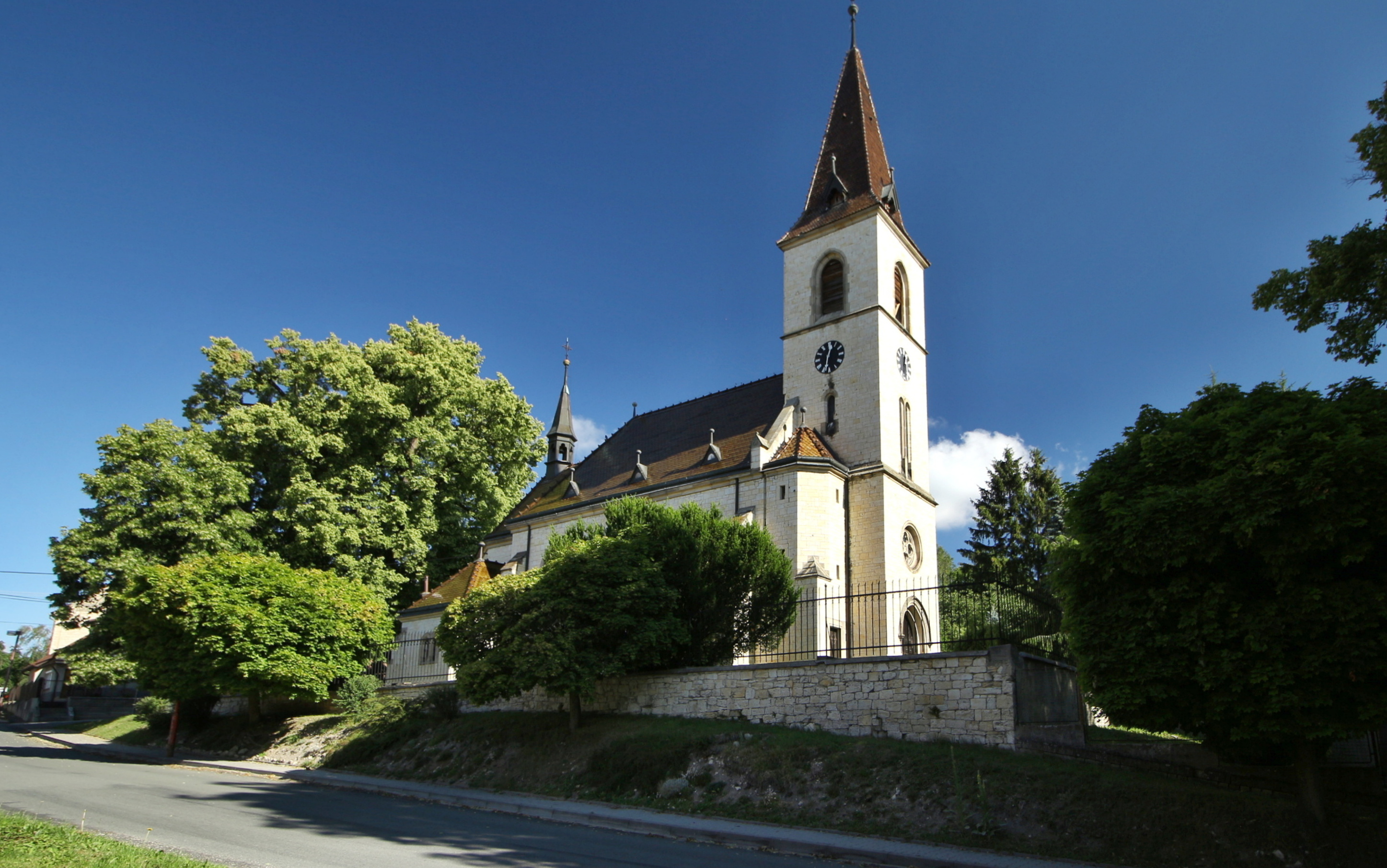 Kroučová